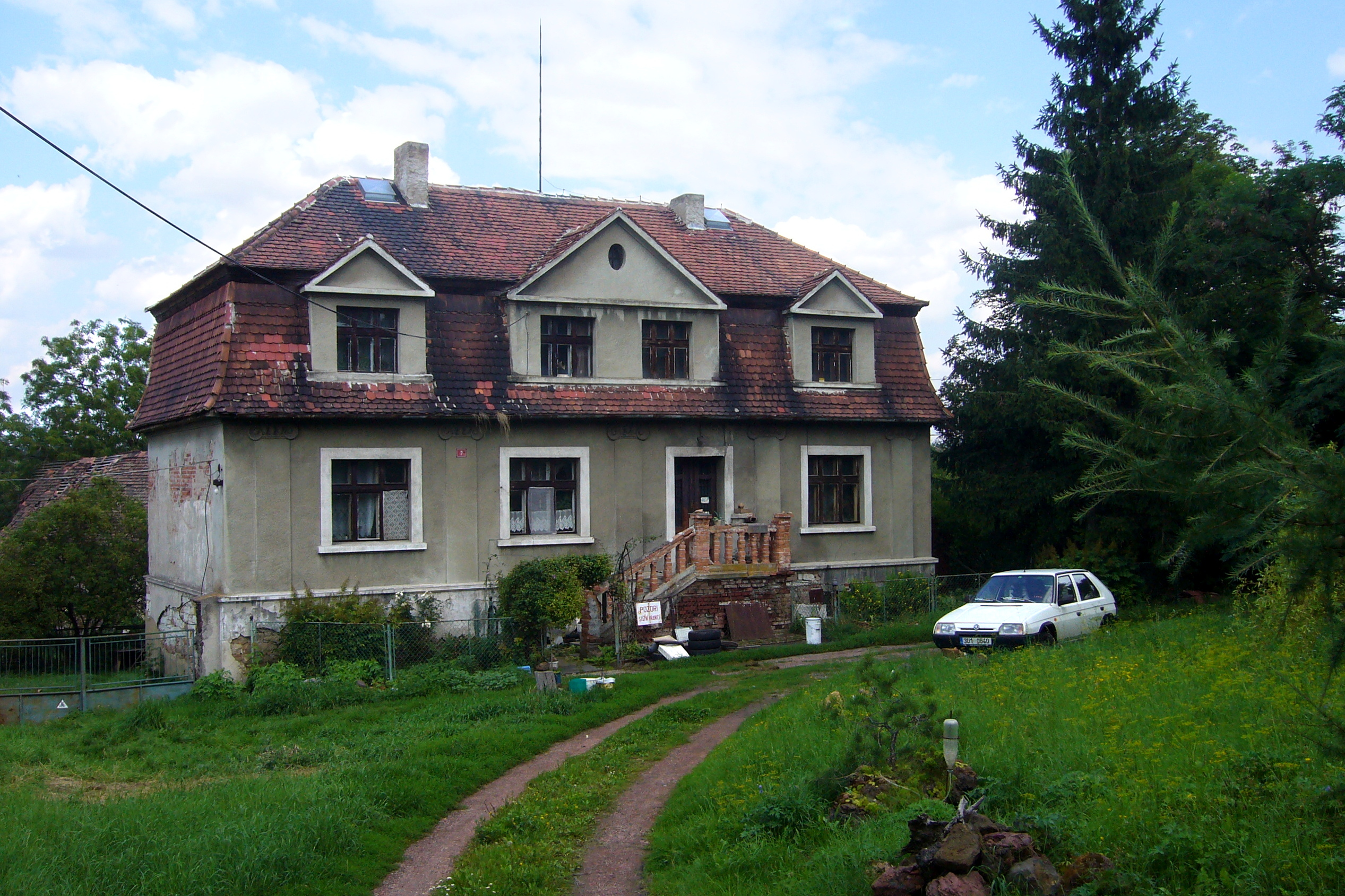 Poslední obydlený dům v Deněticích